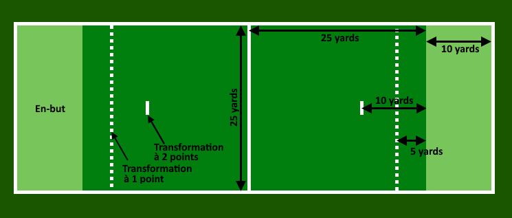 Schéma représentant un terrain de flag football selon les règles IFAF 2019 (5 contre 5 - sans contact)